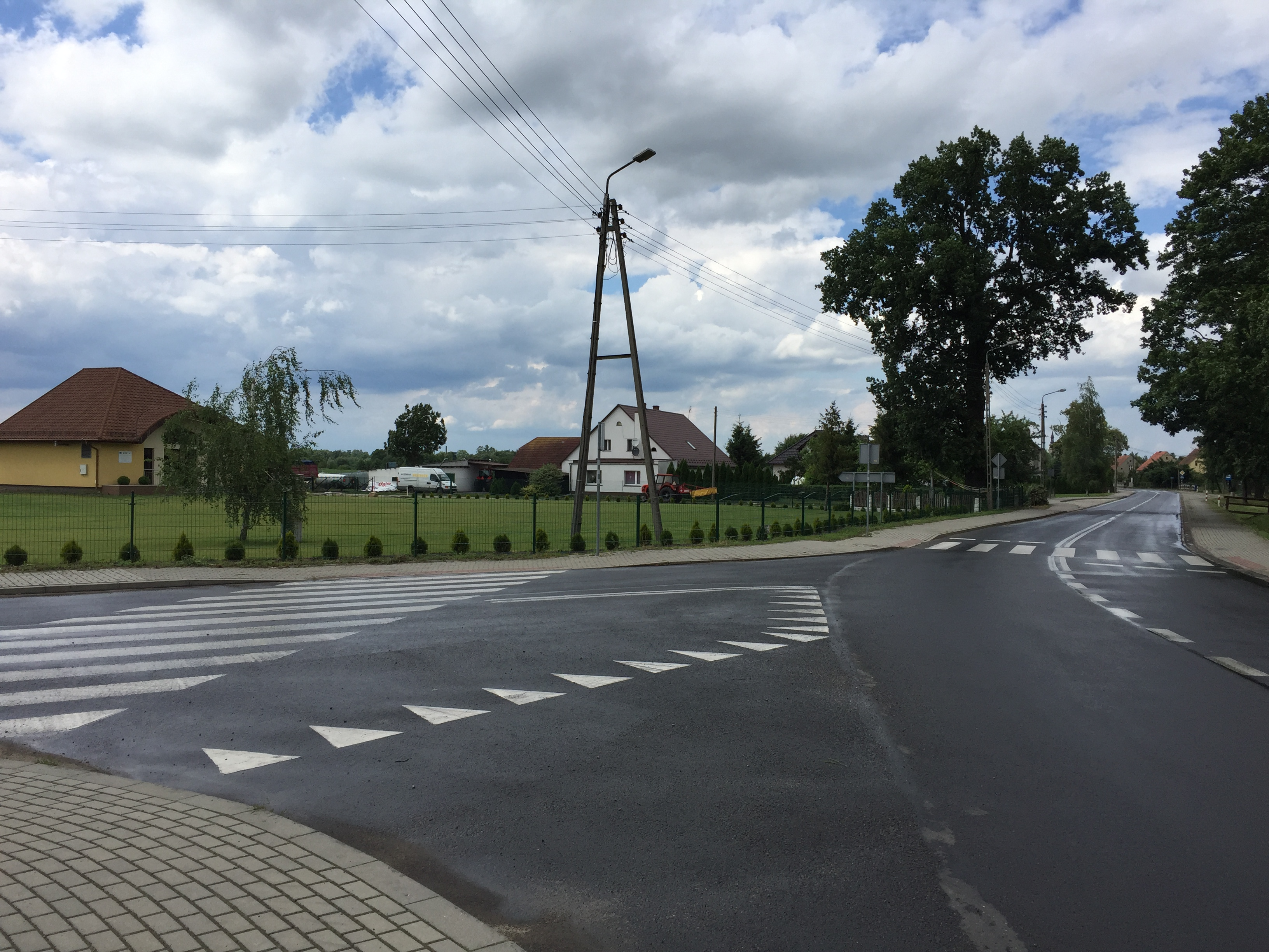 Skrzyżowanie i świetlica wiejska w Karwińcu